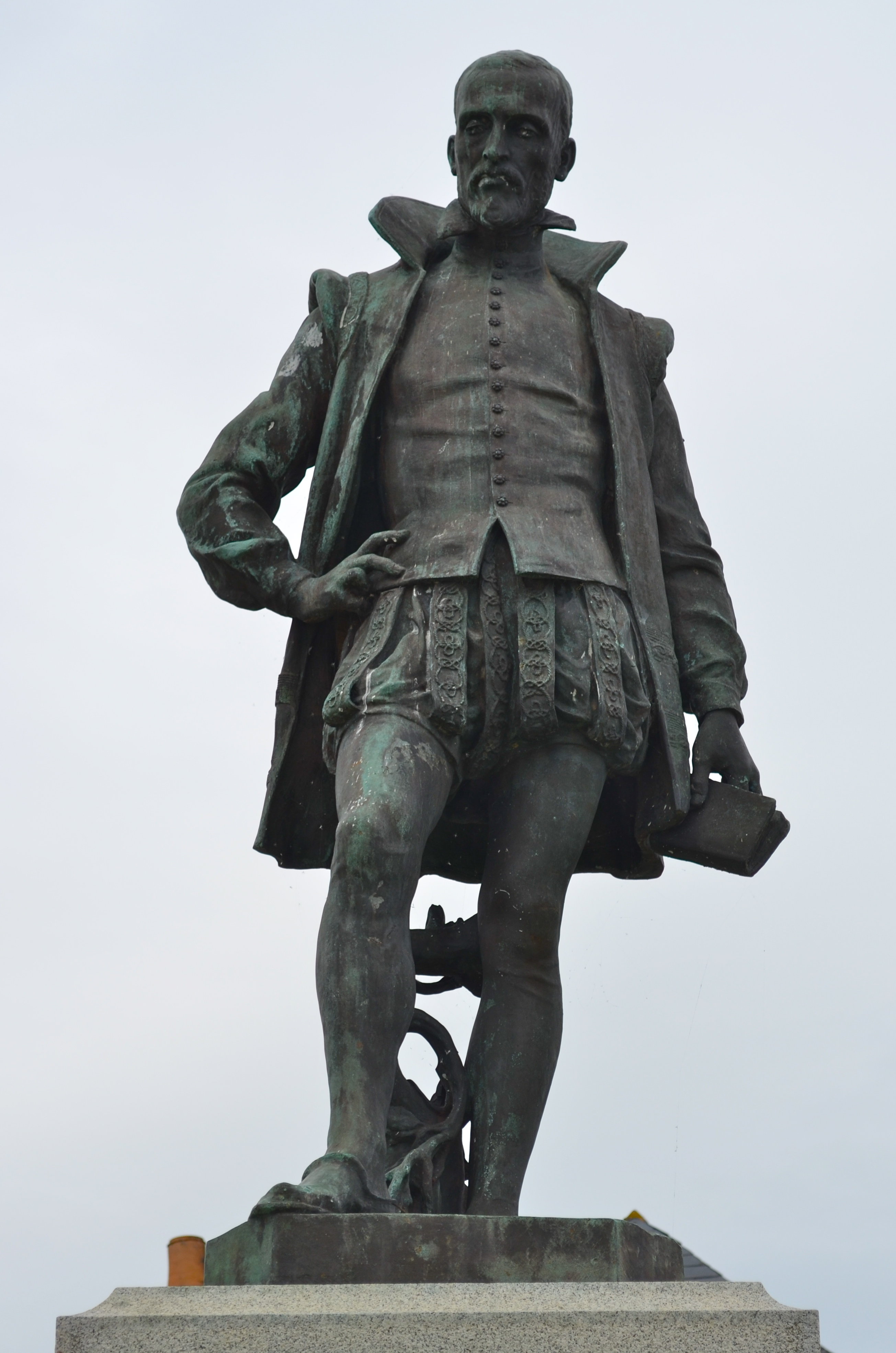 Statue Joachim du Bellay - Ancenis (Loire-Atlantique)